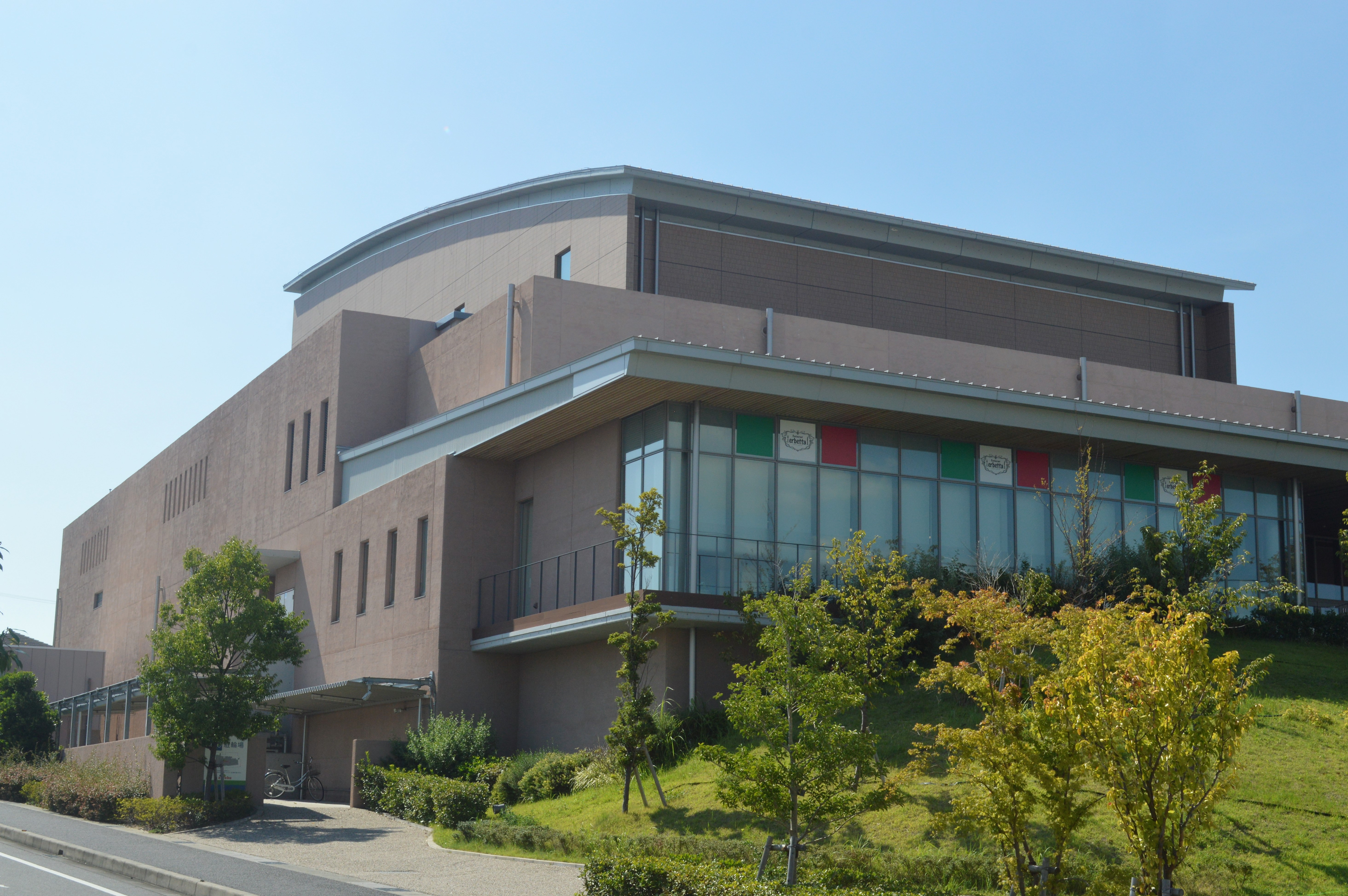 愛知県大府市のおおぶ文化交流の杜。